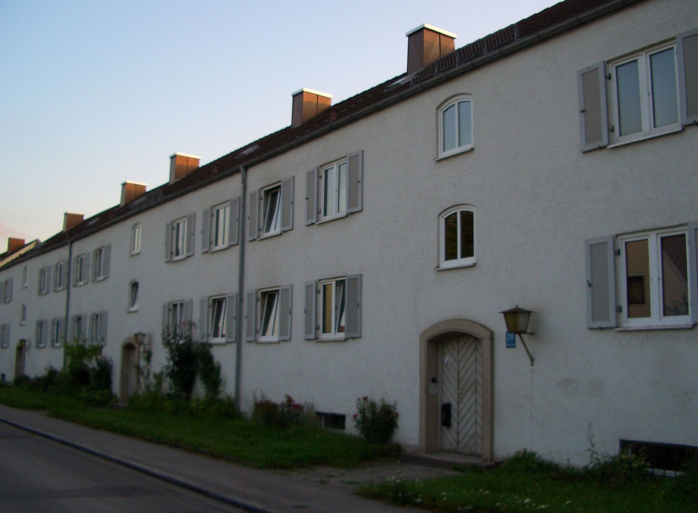 Münchne Siedlung am Gößweinsteinplatz Neuaubing, Häuserzeile